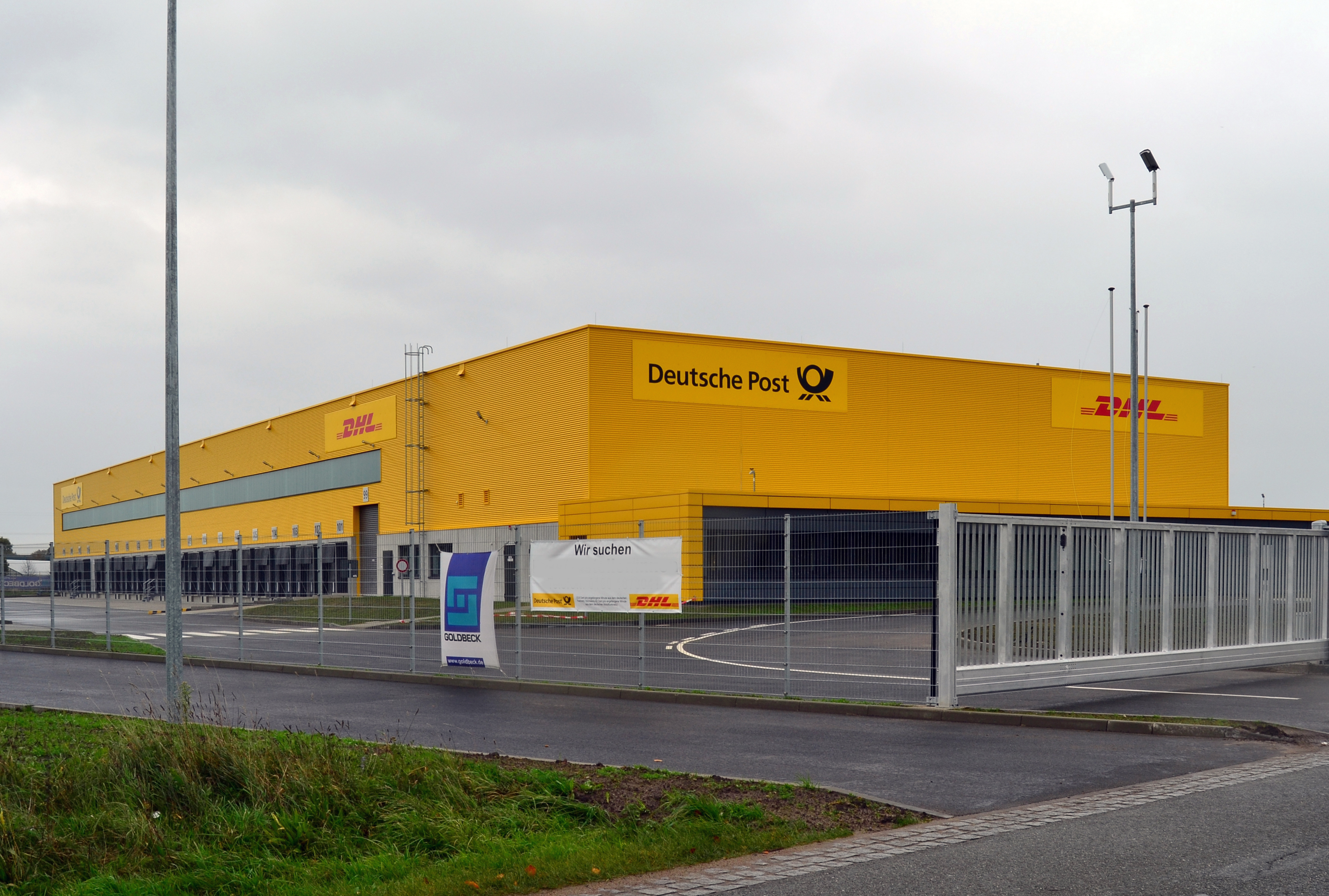 Die mechanisierte Zustellbasis (MechZBn) der Deutsche Post DHL in Tornesch, Baujahr 2013